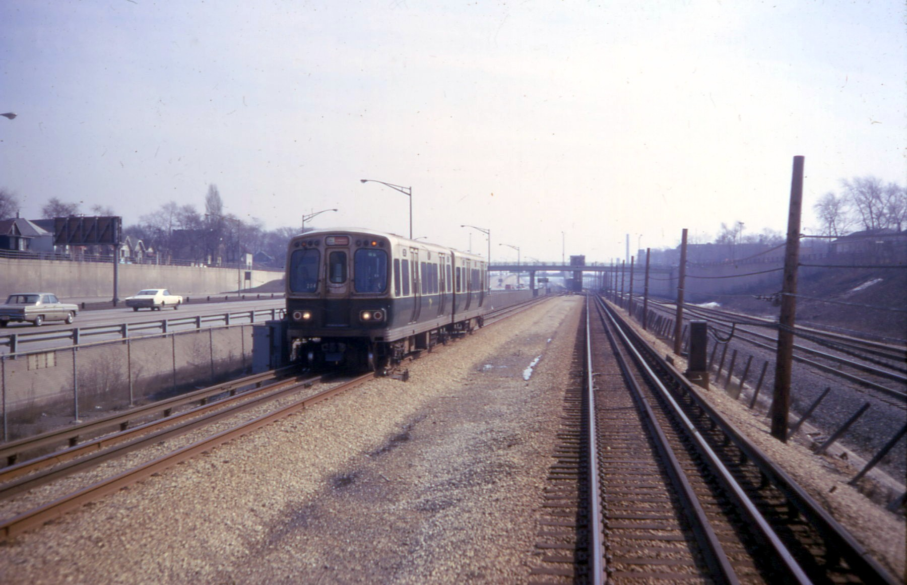 19680317 02 CTA Congress L @ Lombard Ave.